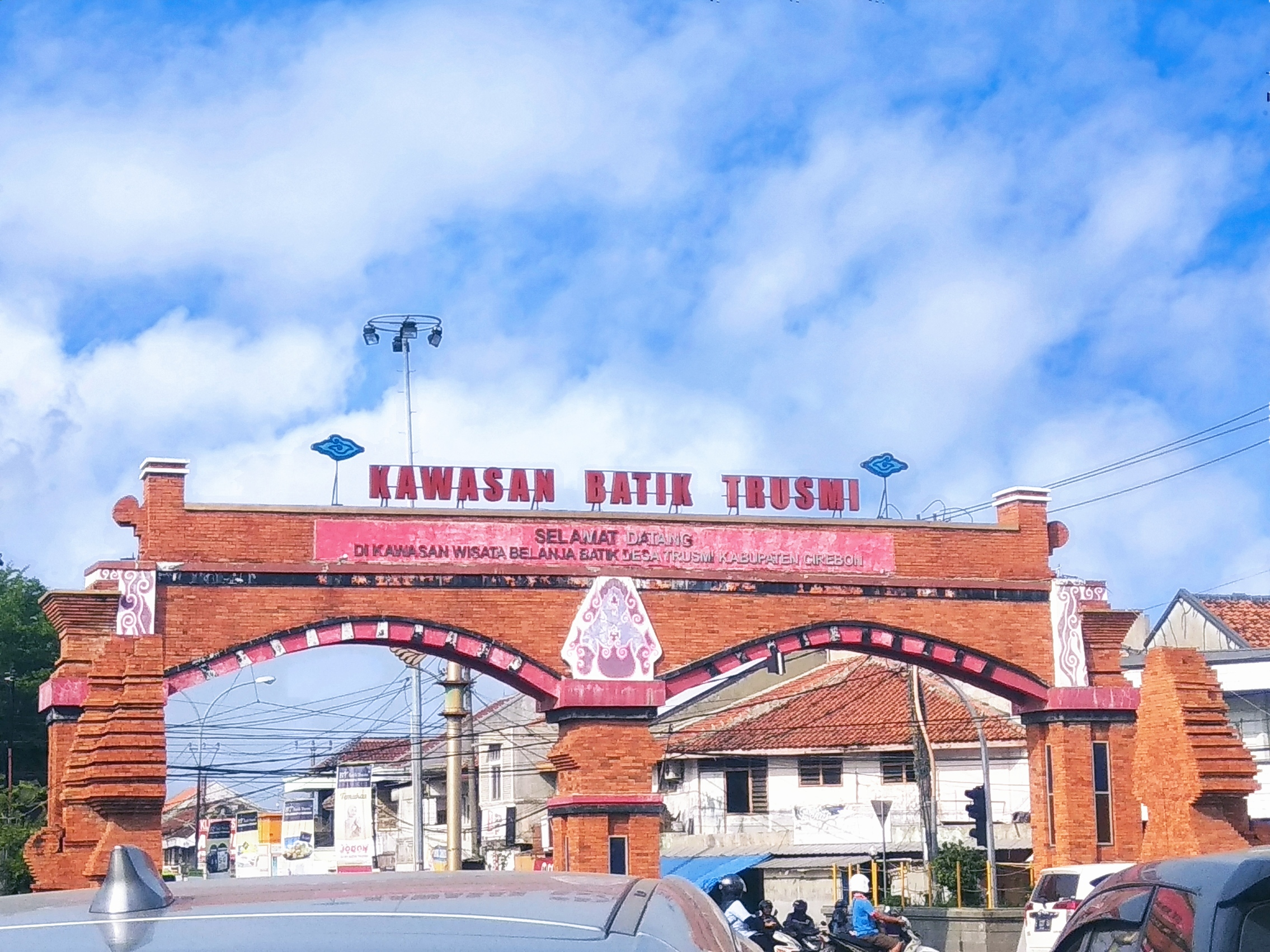 kawasan wisata batik trusmi Jawa: ꦏꦮꦱꦤ꧀ ꦮꦶꦱꦠ ꦧꦠꦶꦏ꧀ ꦠꦿꦸꦱ꧀ꦩꦶ